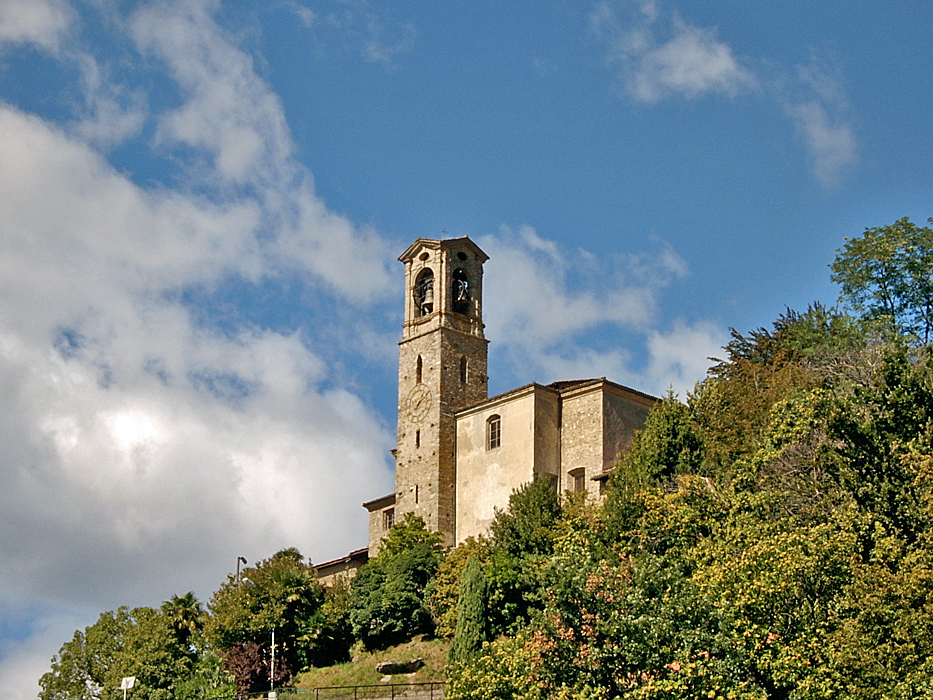 Kirche San Giorgio, Castagnola